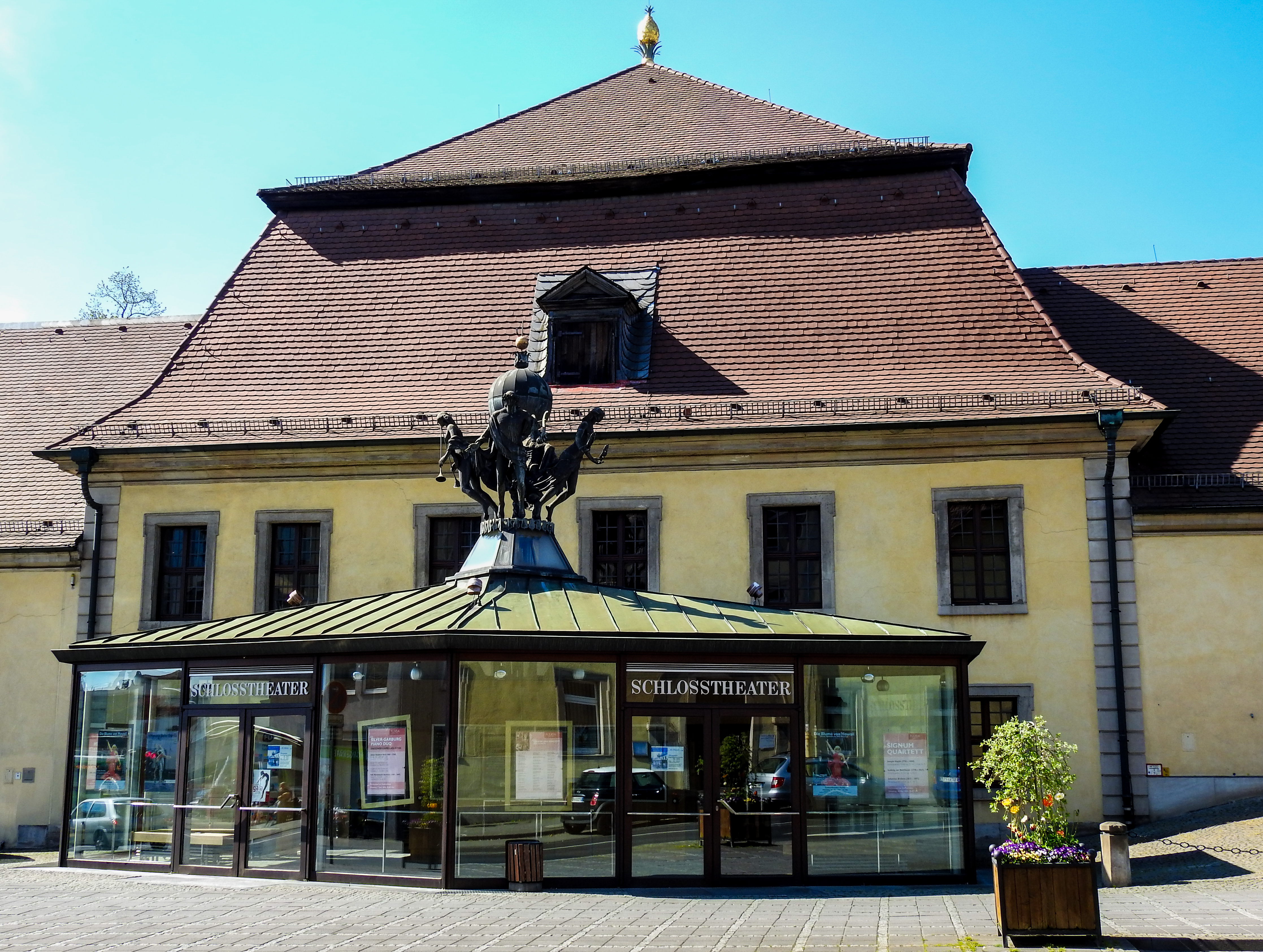 Schlosstheater Fulda Foto von Leroymike